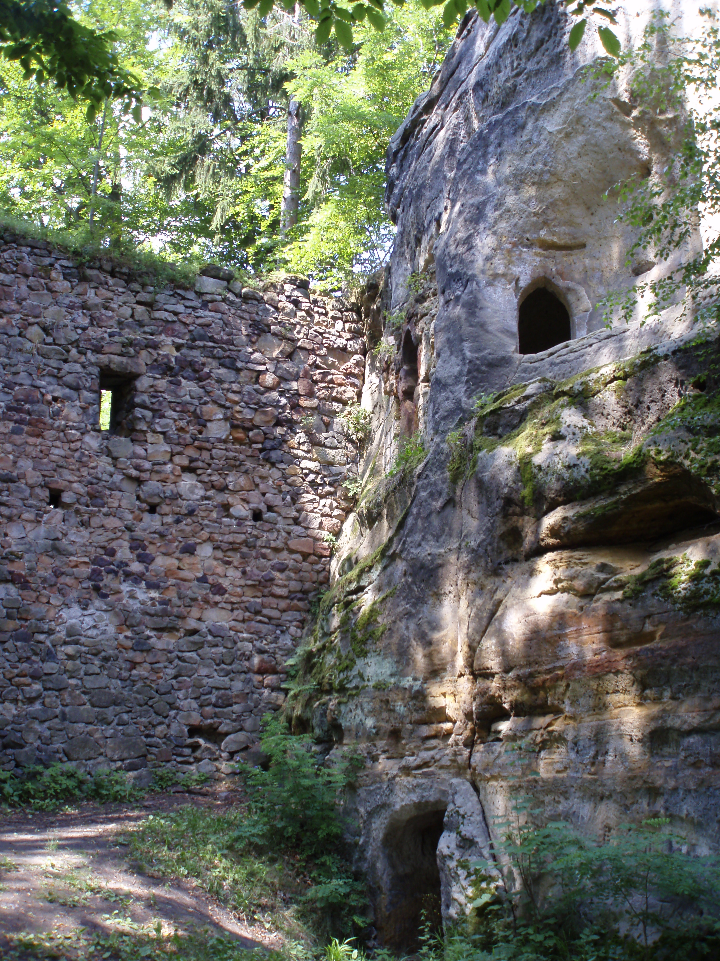 Skalní hrad Svojkov u Zákup, uvnitř